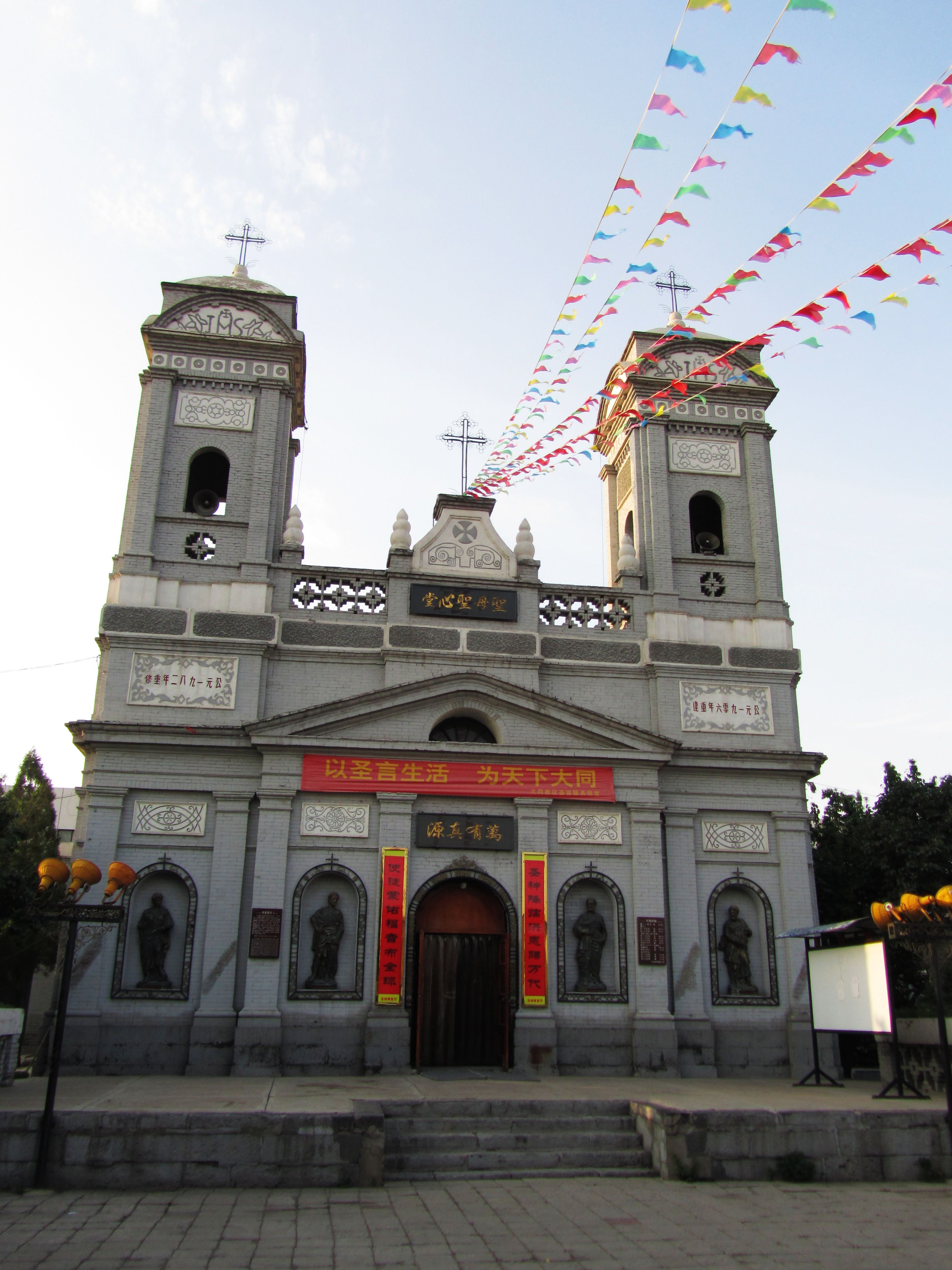 大同圣母圣心堂，天主教大同教区主教座堂。